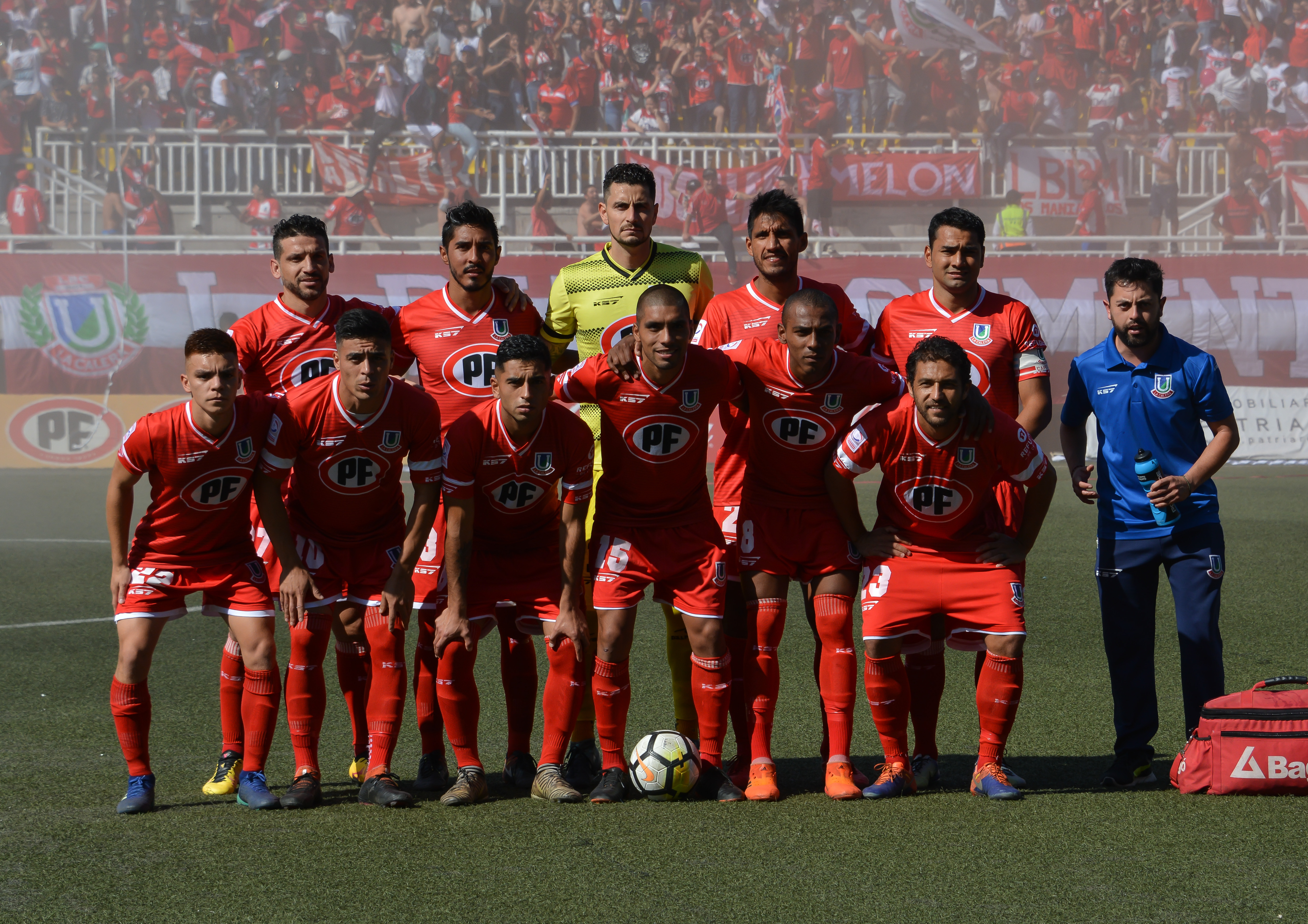 Unión La Calera v Universidad de Chile, Estadio Municipal Lucio Fariña Fernández, Quillota, Chile.